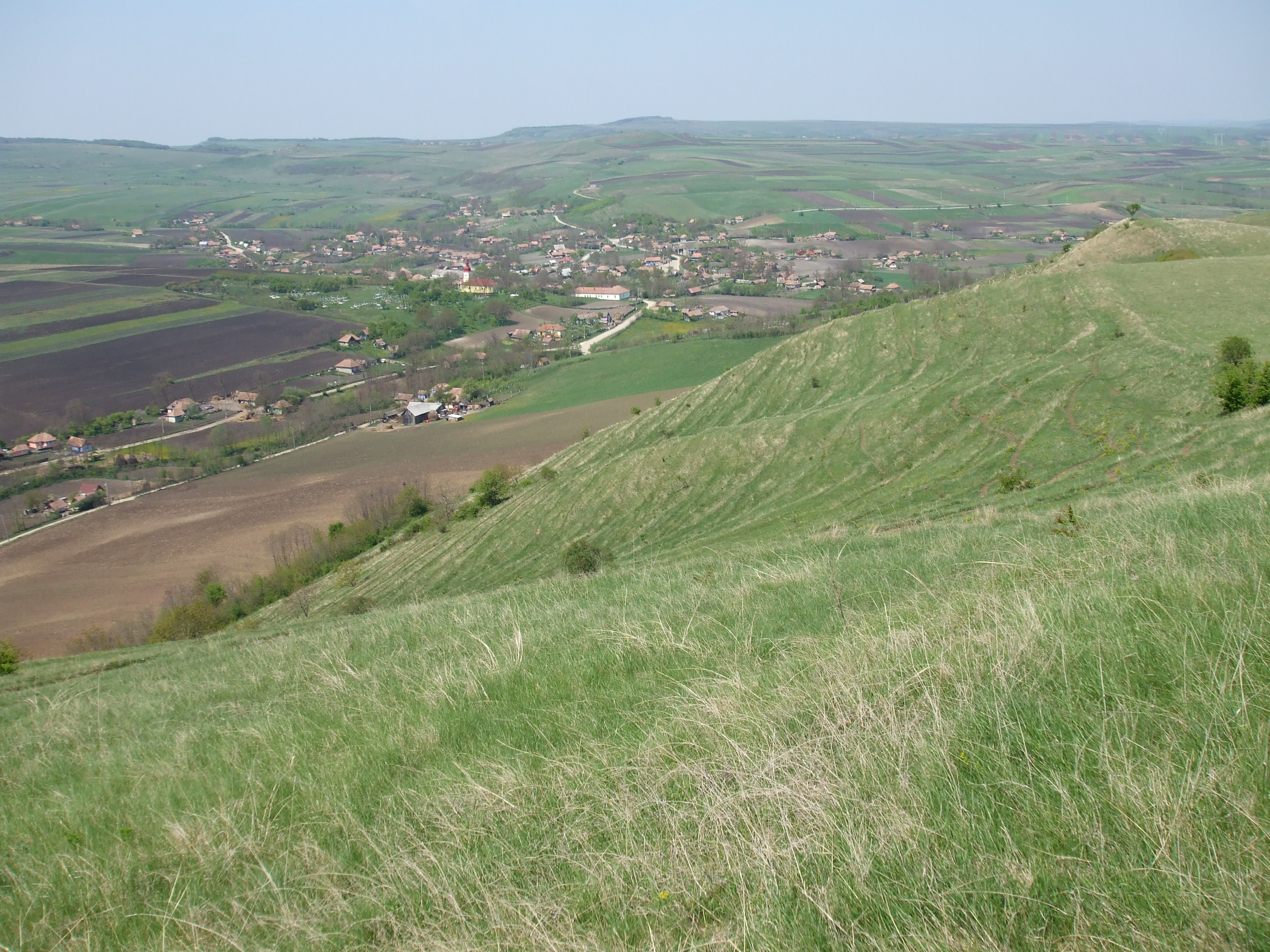 Panorama satului Aruncuta, Cluj, România